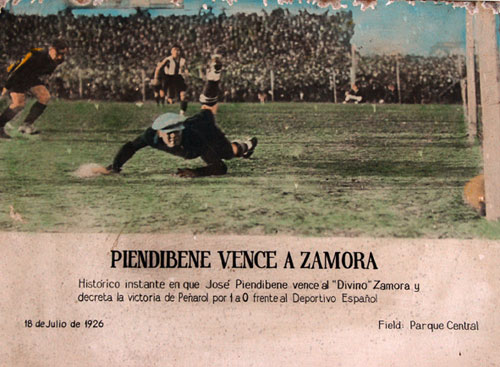 But de Piendibene réussi contre le Divin Zamora